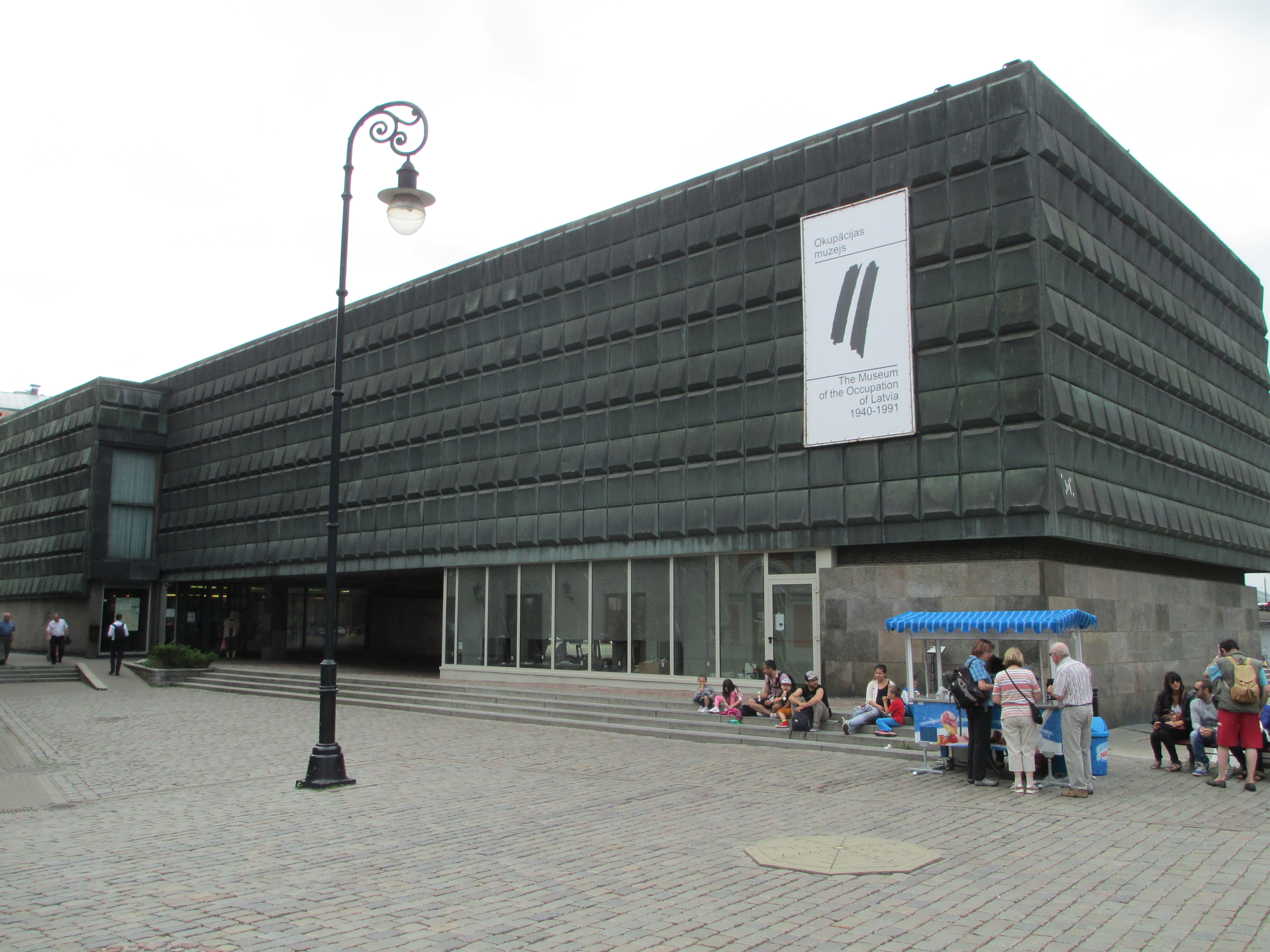 המוזיאון של הכיבוש בלטביה-ריגה